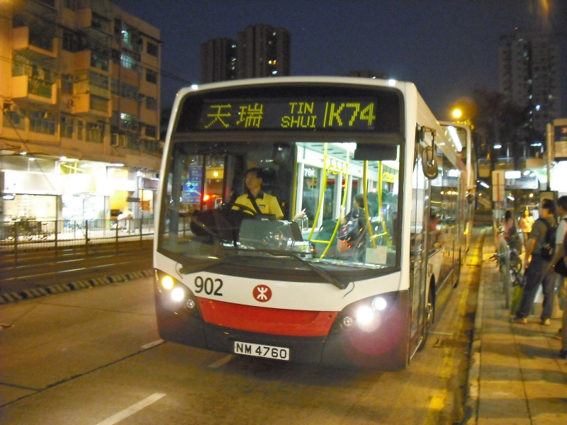 港鐵的ENVIRO 200型巴士，攝於元朗大馬路（近榮華餅家）